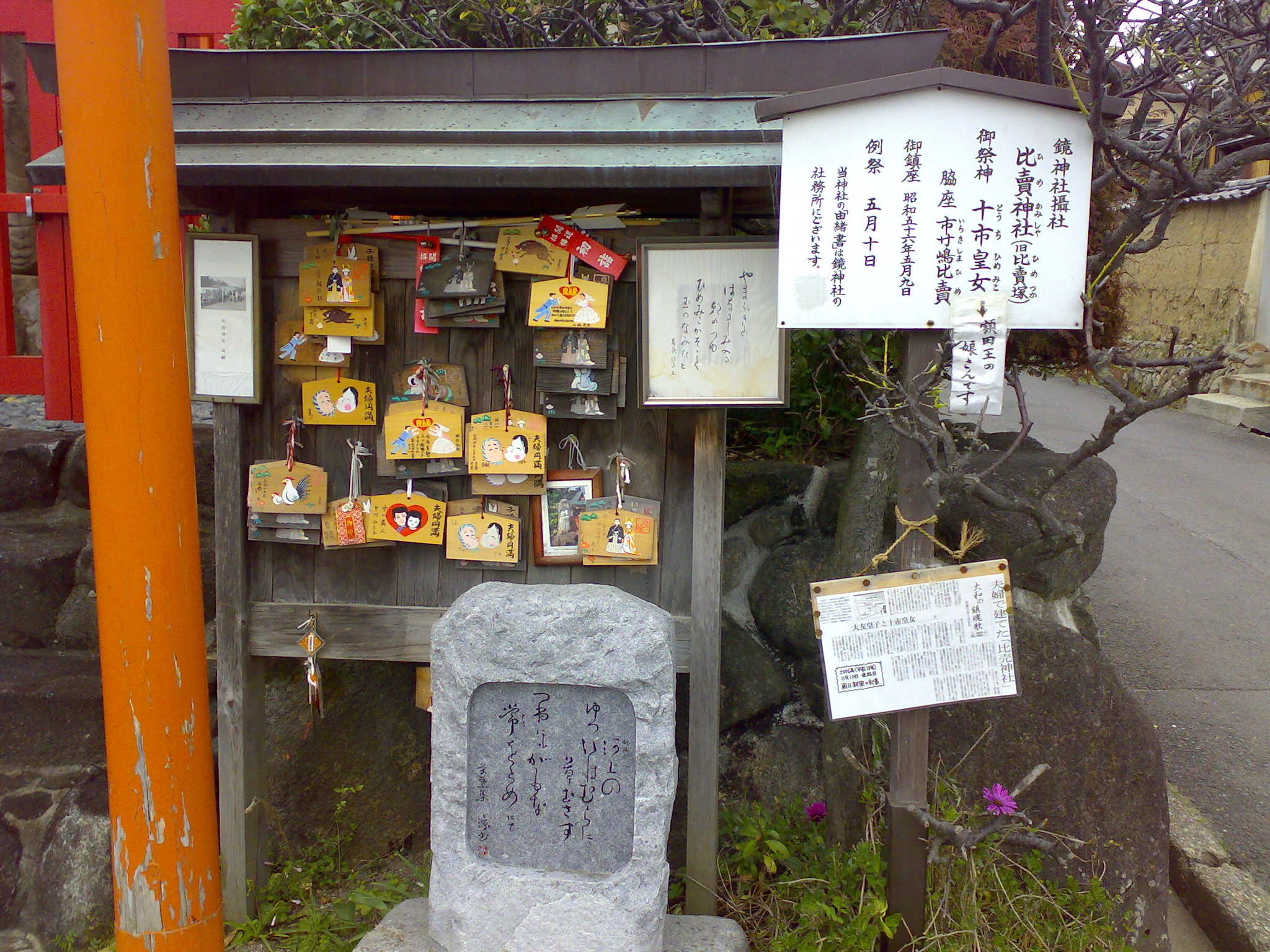 Himegamisha